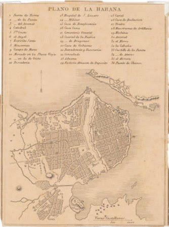 Plano de la ciudad de La Habana hacia 1850